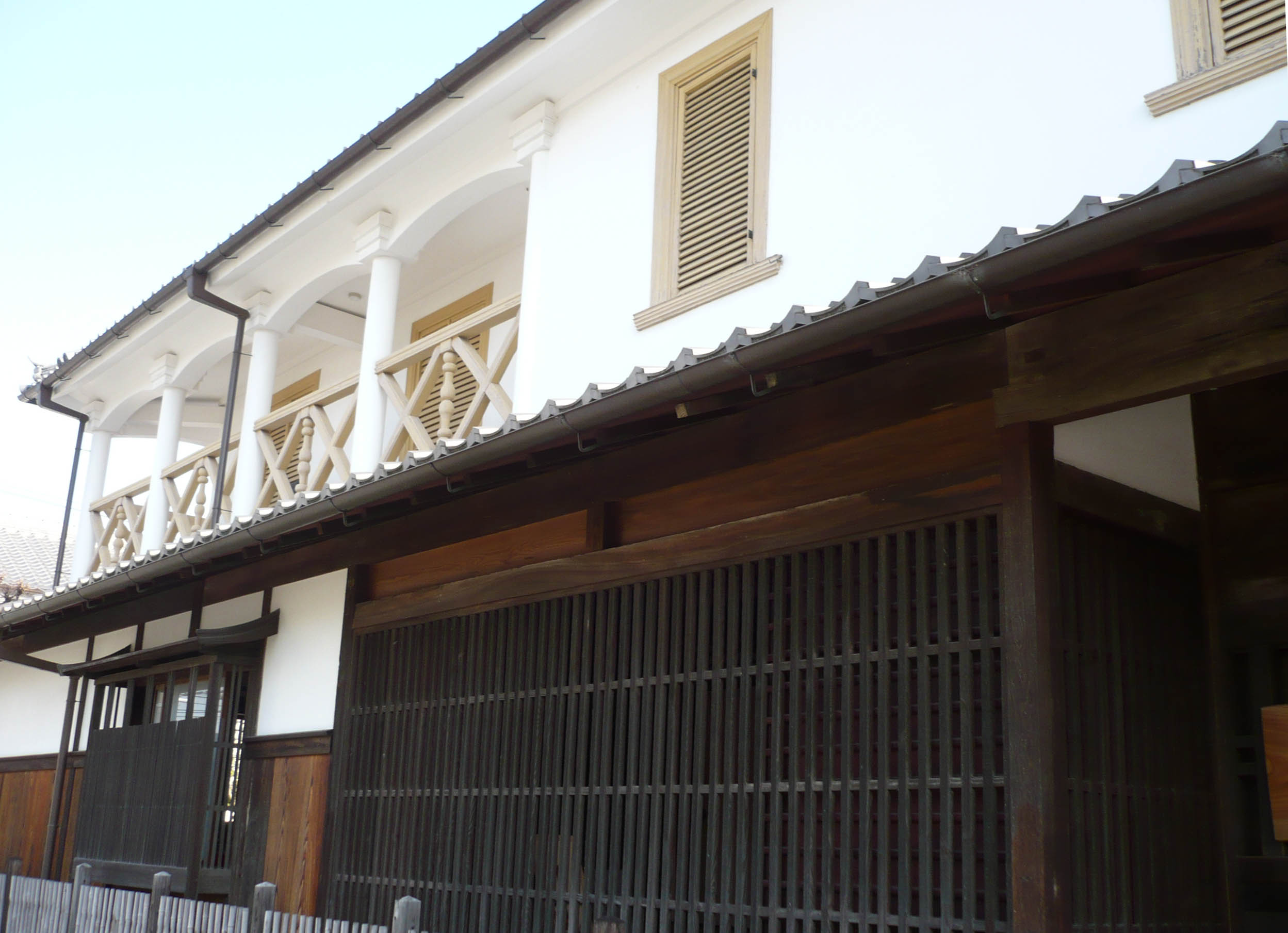 九鬼住宅の側面